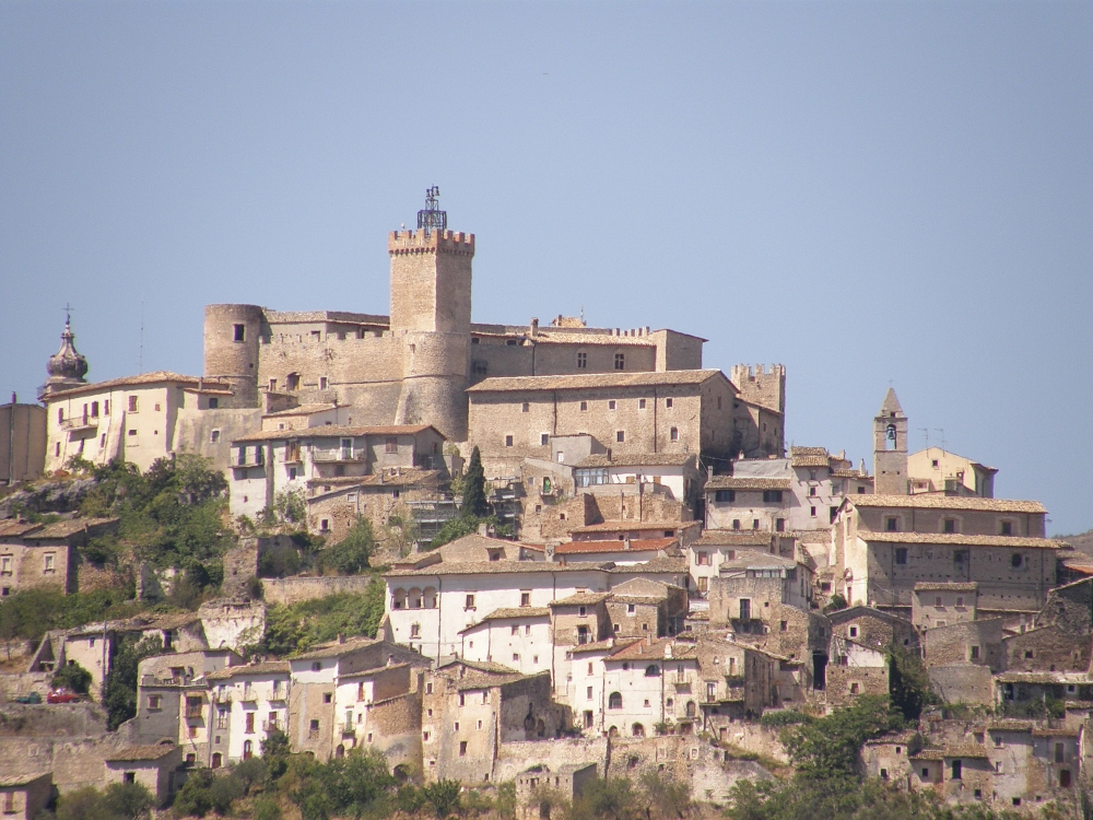 Capestrano